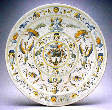 Piatto a raffaellesche. Faenza XVI secolo